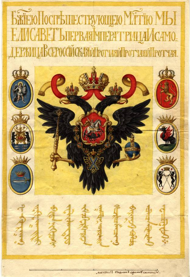 Изображение знамени, которое Императрица Елизавета Петровна пожаловала Дондук-Даши при провозглашении его Ханом Калмыцким. 1757 год. Описание знамени: "Знамя гарнитуровое белое, кругом его по краям на обоих сторонах рамки золотые, на том же гарнитуре... На оном знамени знаки: на одной стороне наверху прописан золотыми российскими литеры титул е.и.в. со окончанием. Под ним герб российской черной двоеглавой под коронами золотыми. В средине герба изображение святого великомученика Георгия на коне с победою змия, под ним на том же гербе нощене кавалерия со изображением же распятия святого апостола Андрея Первозванного под короною золотою. Около знамени на древке три герба под коронами золотыми: Киевской, Астраханской, Казанской и Сибирской губерний. Внизу под всем том надпись калмыцким письмом золотом, вышеозначенного е.и.в титула, а на другой стороне того знамя наверху надпись золотыми российскими литеры с прописанием титула е.и.в. со окончанием. А под титулом написано, что оное знамя повелением е.и.в. дано Дондук-Даше при пожаловании его ханом калмыцким 1757 года. Под тою надписью вензель золотой со изображением е.и.в. высочайшего имя. У того знамя древка деревянная под золотом".